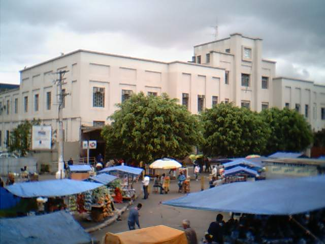 Estação Brás da CPTM vista do Largo da Concórdia, S. Paulo, Brasil